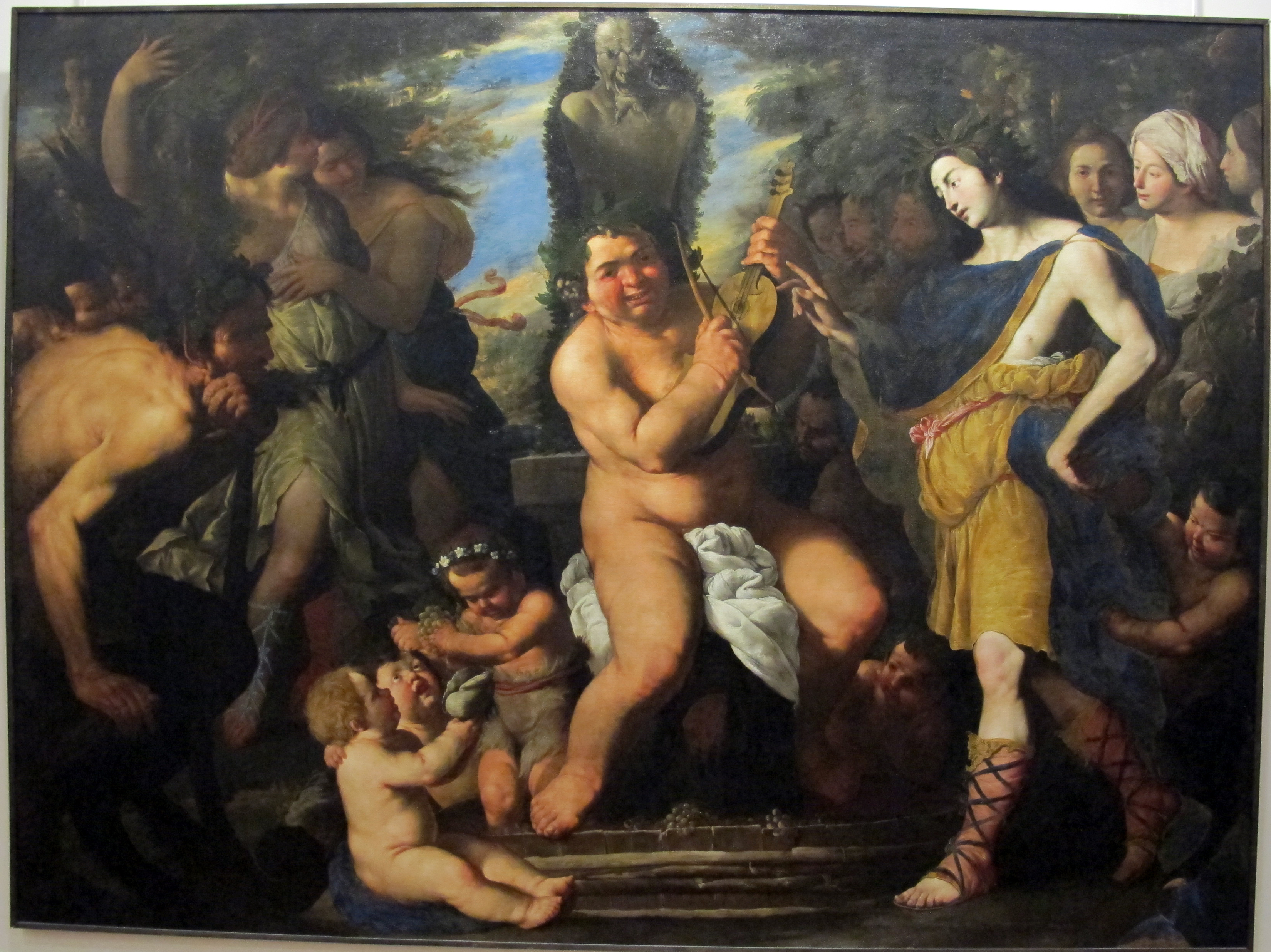 Galleria Napoletana (Museo di Capodimonte)